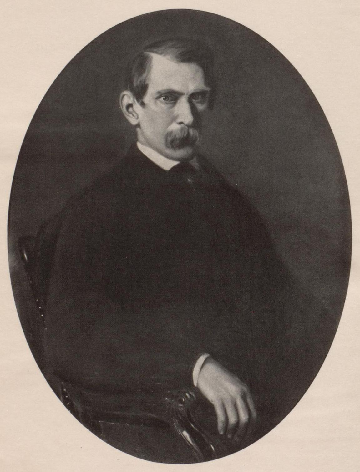 Porträt von Ludwig Freiherr von Biegeleben